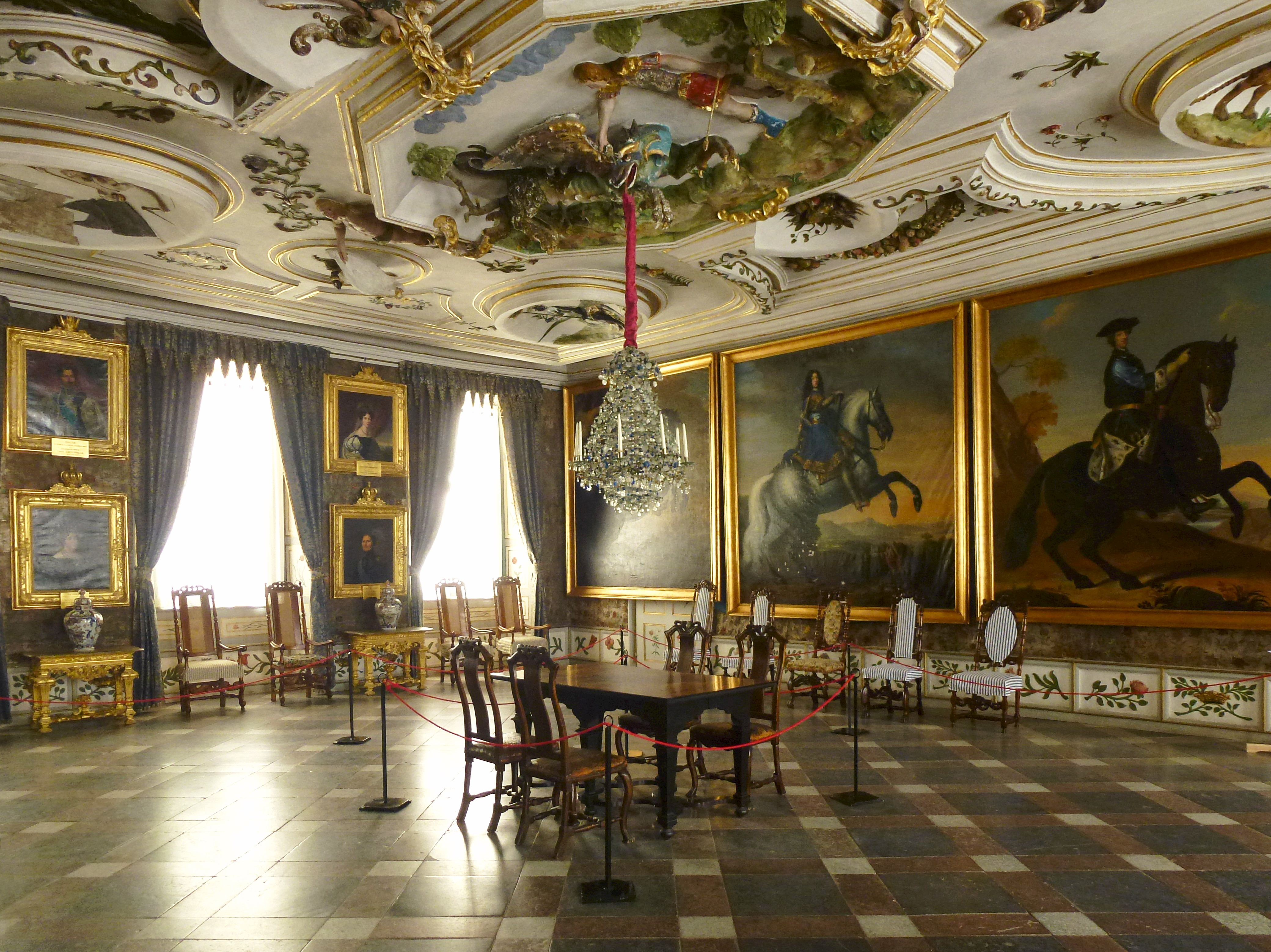 Skokloster Kungssalen. Väggarna är klädda med gyllenläder. Stuckaturtaket är utfört av Hans Zauch 1663-1664. I stucktakets sidofält ser man symboler för världsdelarna. Kungssalen är prydd med flera kungaporträtt, bland vilka det finns ett Ehrenstrahl-konterfej av Karl XI.Ljuskronan i Kungssalen hänger där sedan 1672. Den är tillverkad av Melchior Jung (1615-1678) vid Melchior Jungs glasbruk (Jungs glashytta) i Stockholm. Man vet inte exakt när den tillverkades, men den kom till Skokloster 1672. Ljuskronan har gjutna pärlor och hängen av glas. Modellen är av venetiansk barocktyp.